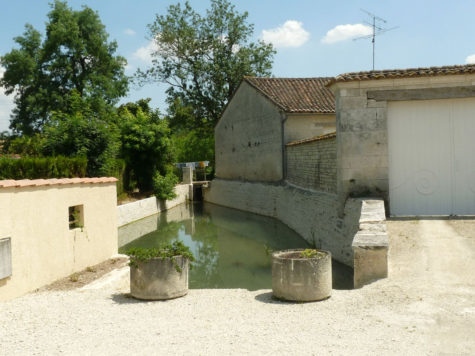 Ruisseau de l'Argence vue de Churet (Anais), Charente, France